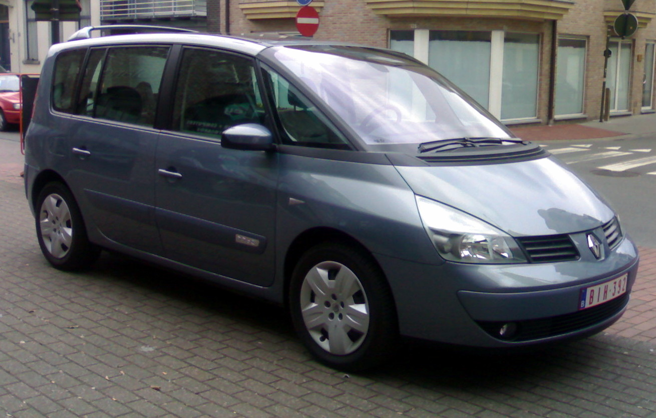 Renault Espace